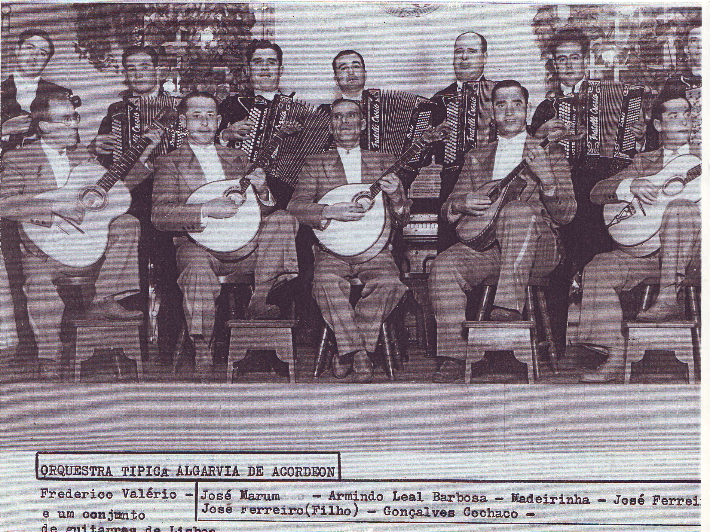 Orquestra Típica de Acordeon Algarvia, fazendo parte seu filho e António Madeirinha